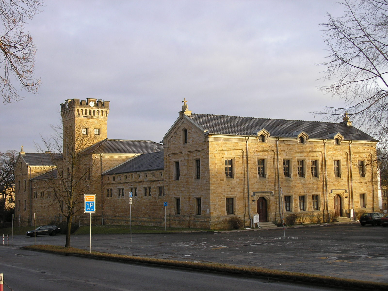 Der Marstall an der Parkallee in Gotha (Thüringen).